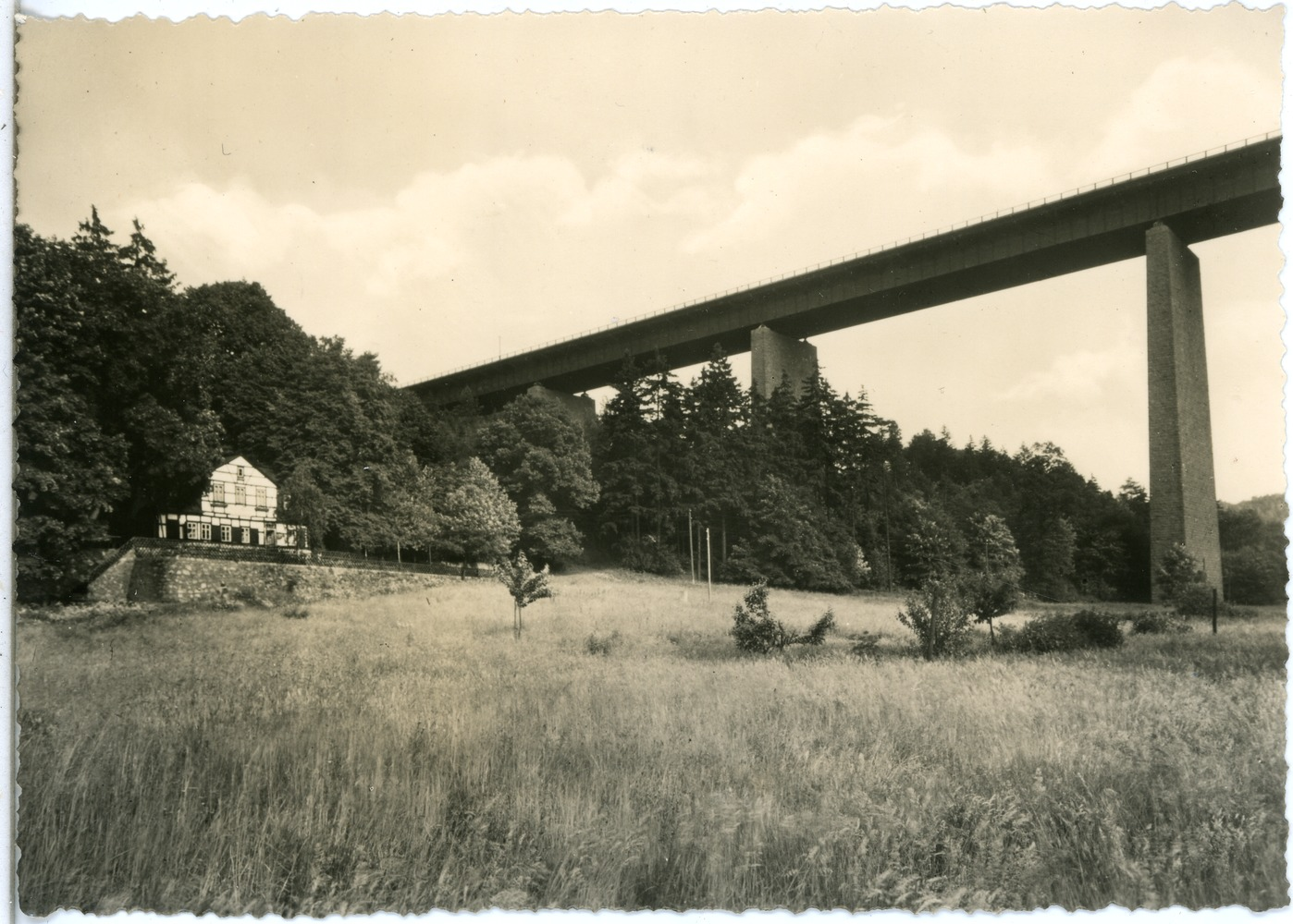 Nossen; Huthaus mit Autobahnbrücke This postcard is from publisher Brück & Sohn in Meißen ( postcard has a unique number 29765 and is available in a higher resolution at the publisher. This images was uploaded in a cooperation project between Wikipedians and the publisher.